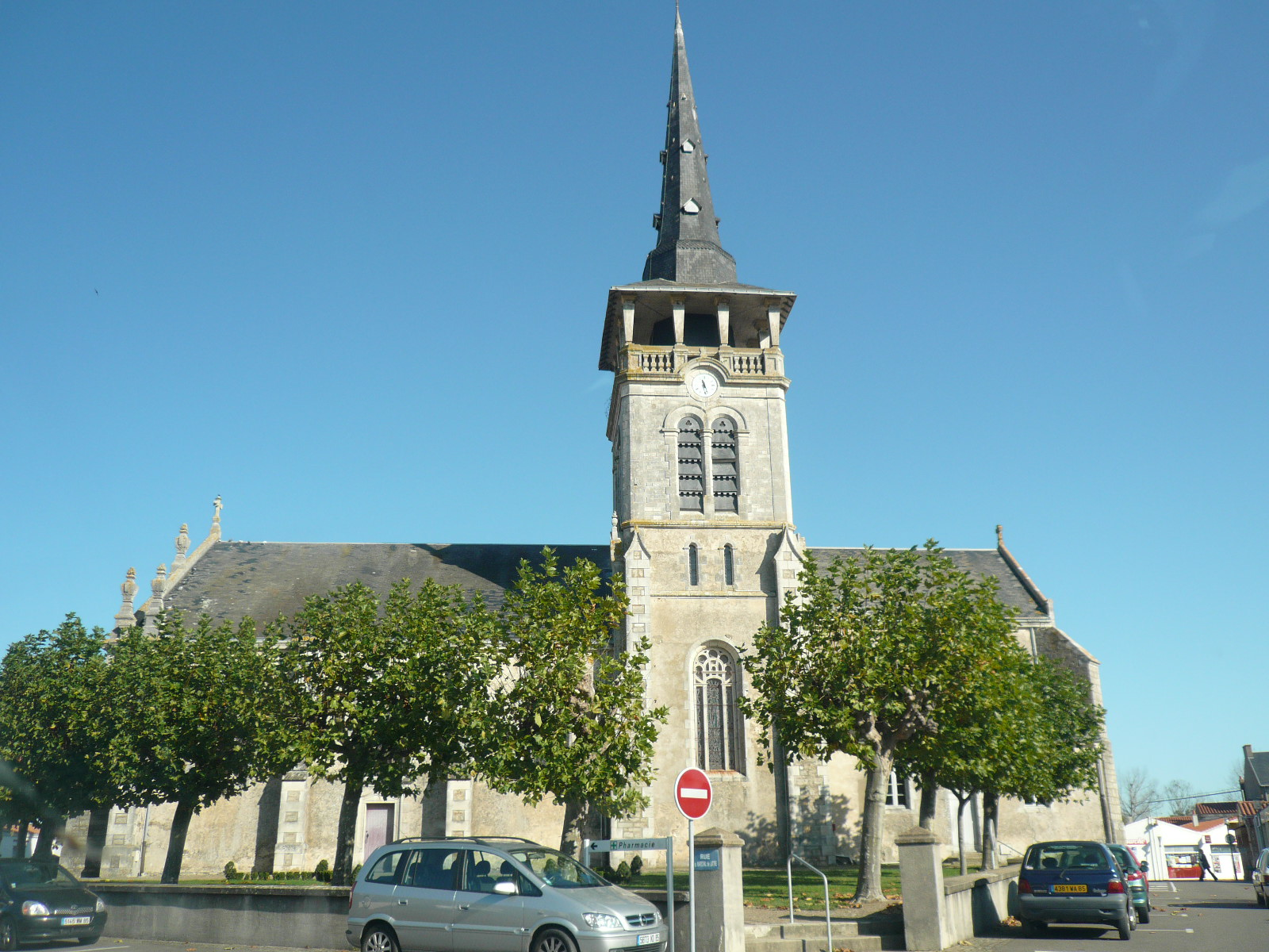 Eglise de l'ile d'Olonne